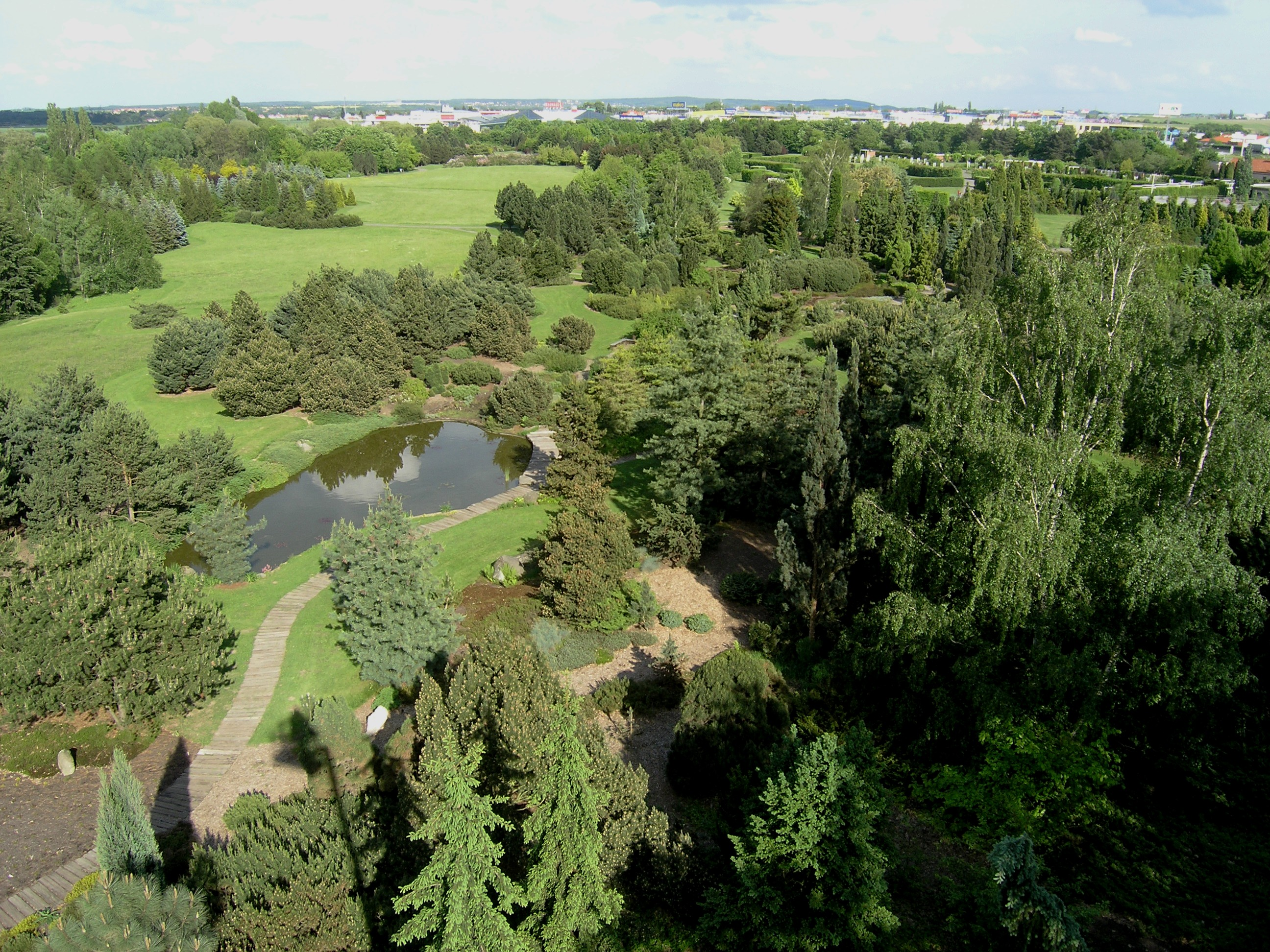 Pohled z výšky